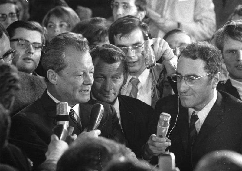 28./29.9.1969 Wahlabend in der SPD-Zentrale Der SPD-Vorsitzende und amtierende Bundesaussenminister Willy Brandt unterstreicht in einer Erklärung die klare Absicht seiner Partei, die Führung der Bundesregierung zu übernehmen und diese neue Regierung mit der FDP zu bilden. Wahlen zum Sechsten Deutschen Bundestag 28.9.1969 SPD 42,7% 224 Sitze CDU 36,6% 193 Sitze CSU 9,5% 49 Sitze FDP 5,8% 30 Sitze Sonstige 5,4%